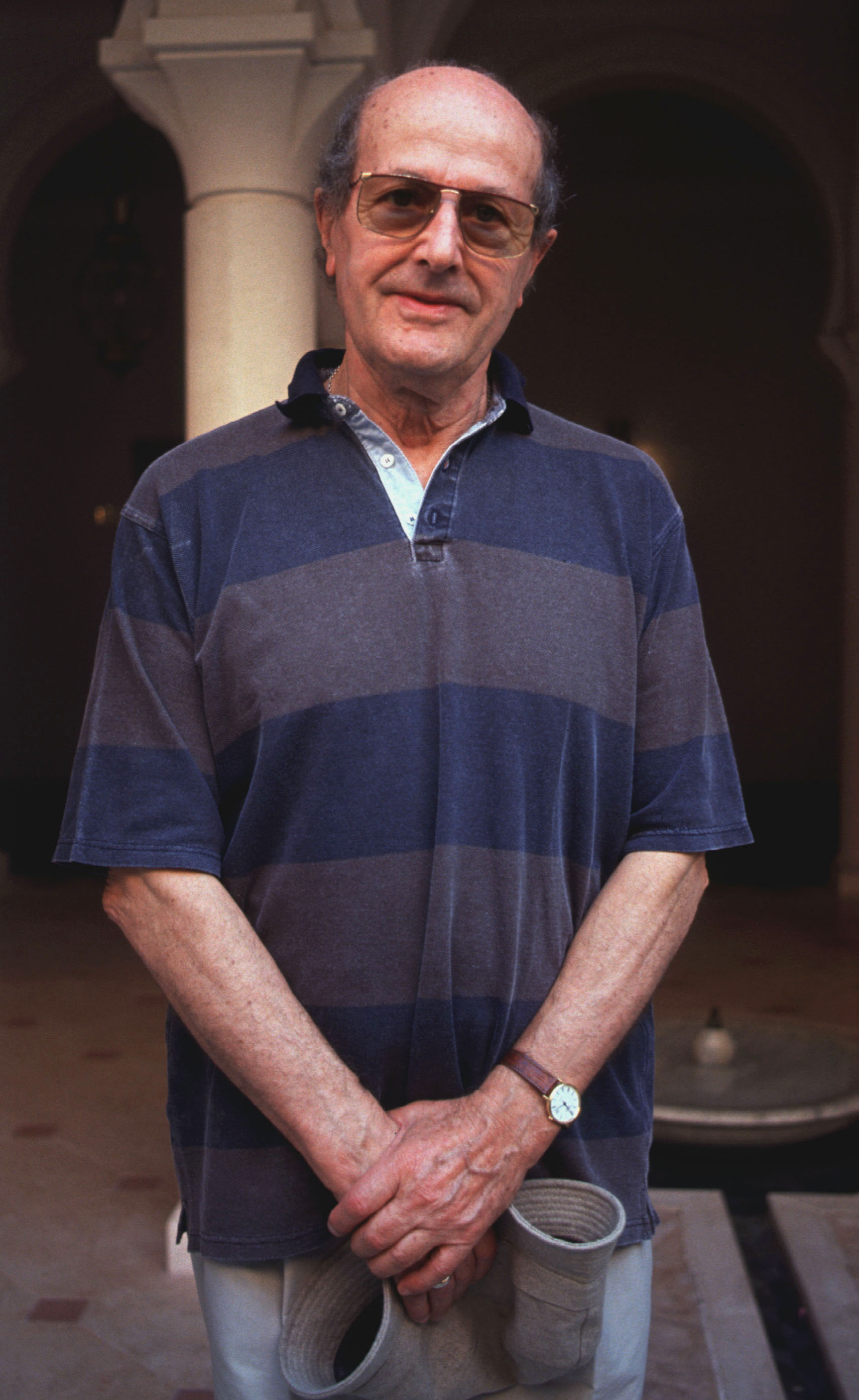 Il regista portoghese Manoel de Oliveira alla Mostra del Cinema di Venezia del 1991